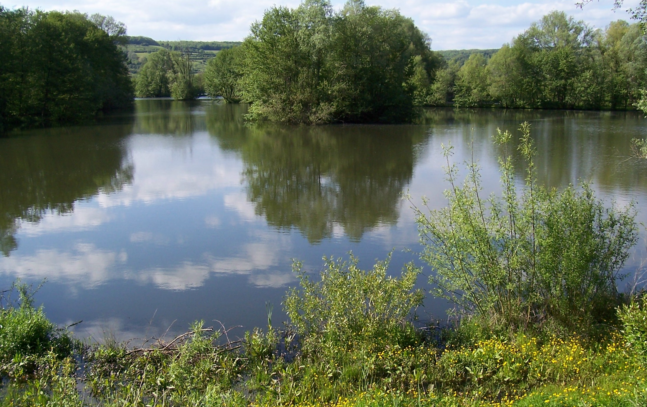 Beschreibung: Altarm der Blies bei Bliesbrück Quelle: selbst fotografiert Lizenz: GNU Freie Dokumentationslizenz